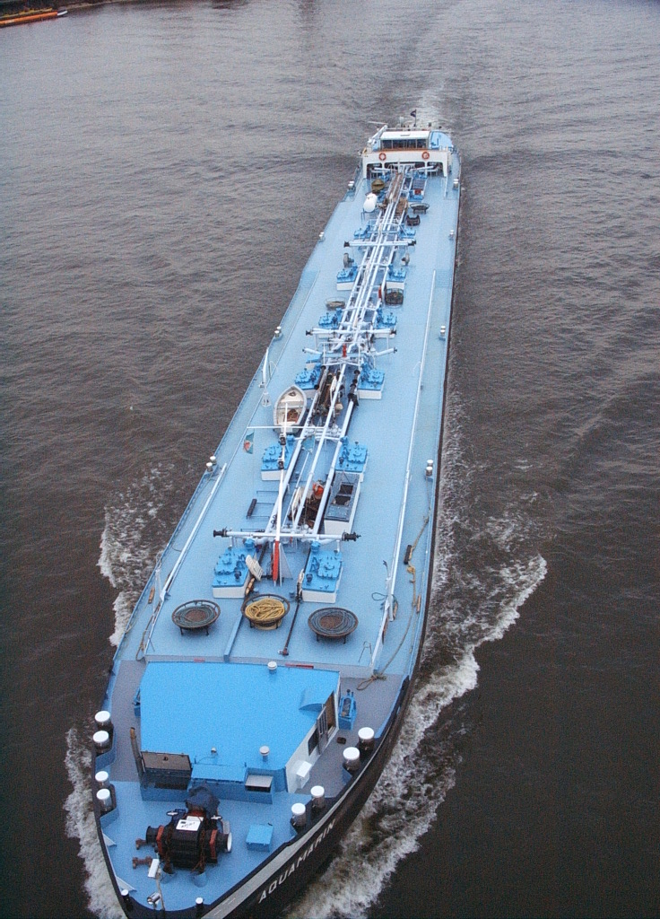 m.s. Aquamarin op de Rijn nabij de Duitse stad Emmerich. ENI Nummer: 02323566, gebouwd met Europanummer 2310314 en heeft ook gevaren onder 7001068 Bouwjaar: 1958 Werf van aanbouw: Gutte Hoffnungshütte in Walsum, Duitsland met een lengte van 85,85 m en naderhand verlengd Lengte: 110 m Breedte: 11 m Diepgang: 2,8 m Laadvermogen: 2302 ton Voortstuwing: Deutz 2 x 930 pk